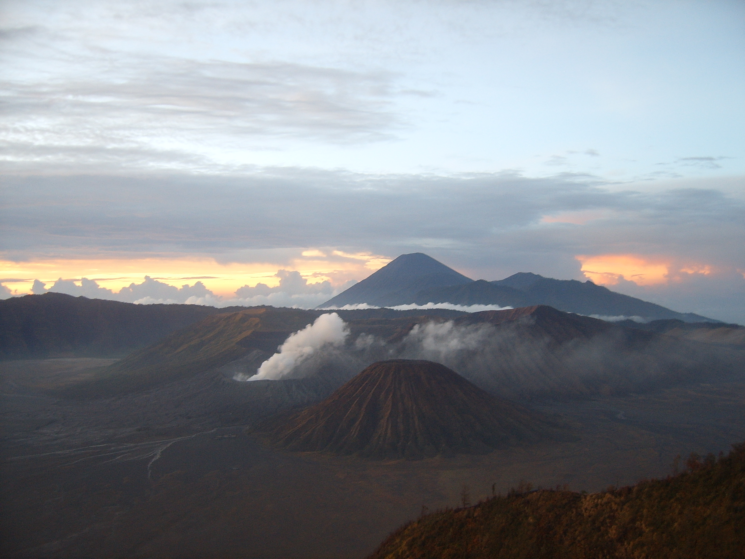 Bromo and Semeru volcanos